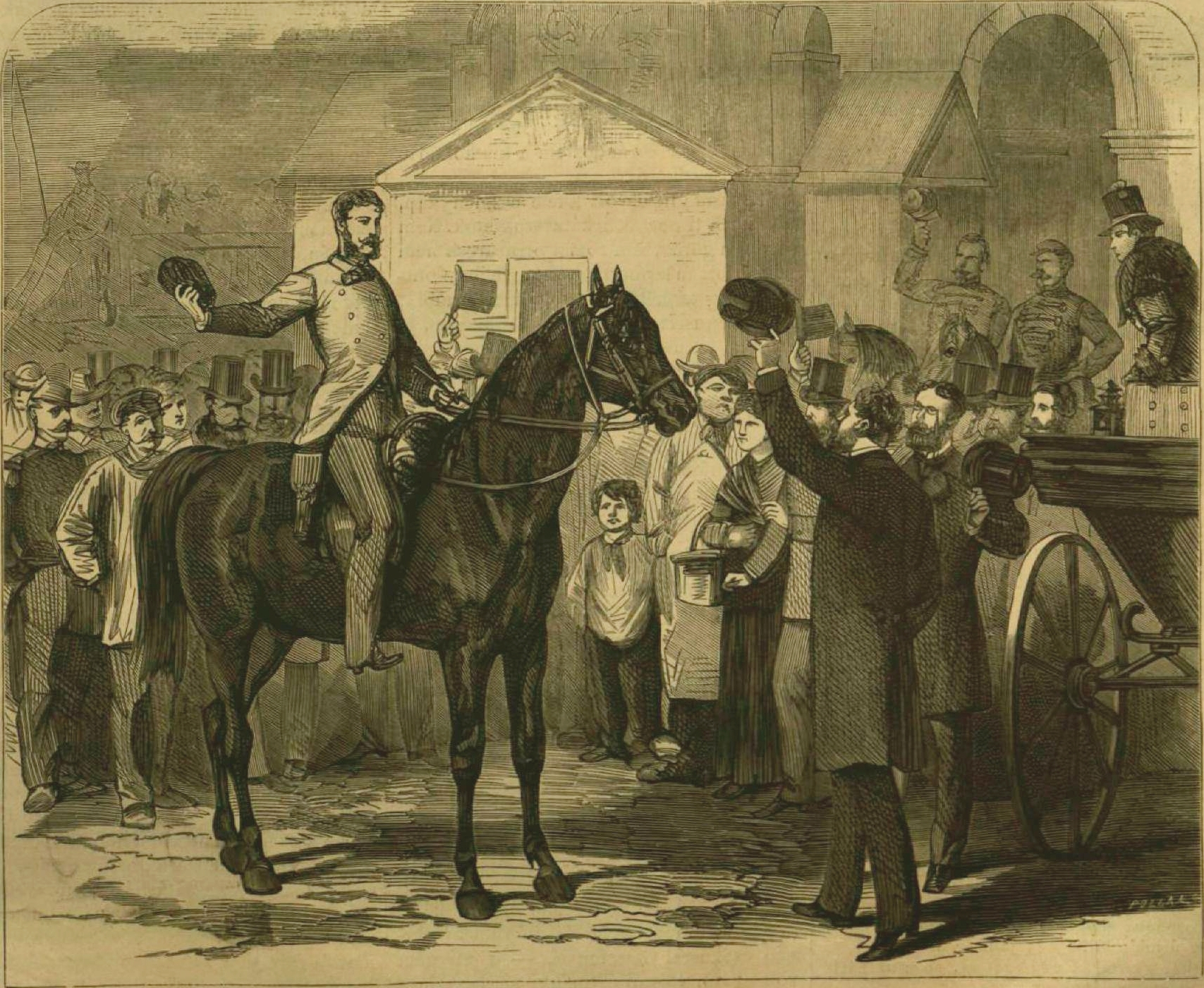 Zubovics Fedor megérkezése Párizsba Ismertető szöveg: "Ez az, a mi Zubovics lovas-utját nemcsak érdekessé, de a lótenyésztés és idomítás terén értékessé is teszi, becses adatot szolgáltatván az e téren szenvedélylyel foglalkozók kezébe a sport egy oly nemének fejlesztésében, mely távol van az állatkínzásnak még árnyékától is, s ugy viszonylik az előbb érintett adatokhoz, mint például az izomedző tornagyakorlat a nyaktörő akrobatikus előadásokhoz, vagy a hajdankori merész rohamu s nyers erőre támaszkodó hadviselés a jelenkori számításon alapuló hadmozdulatokhoz, állásokhoz és menetekhez. A különbség e kettő közt az, a mi Mars és Minerva harczmodora között." (Forrás:Vasárnapi Ujság 1874. 21. évf. 48. sz. november 29.)